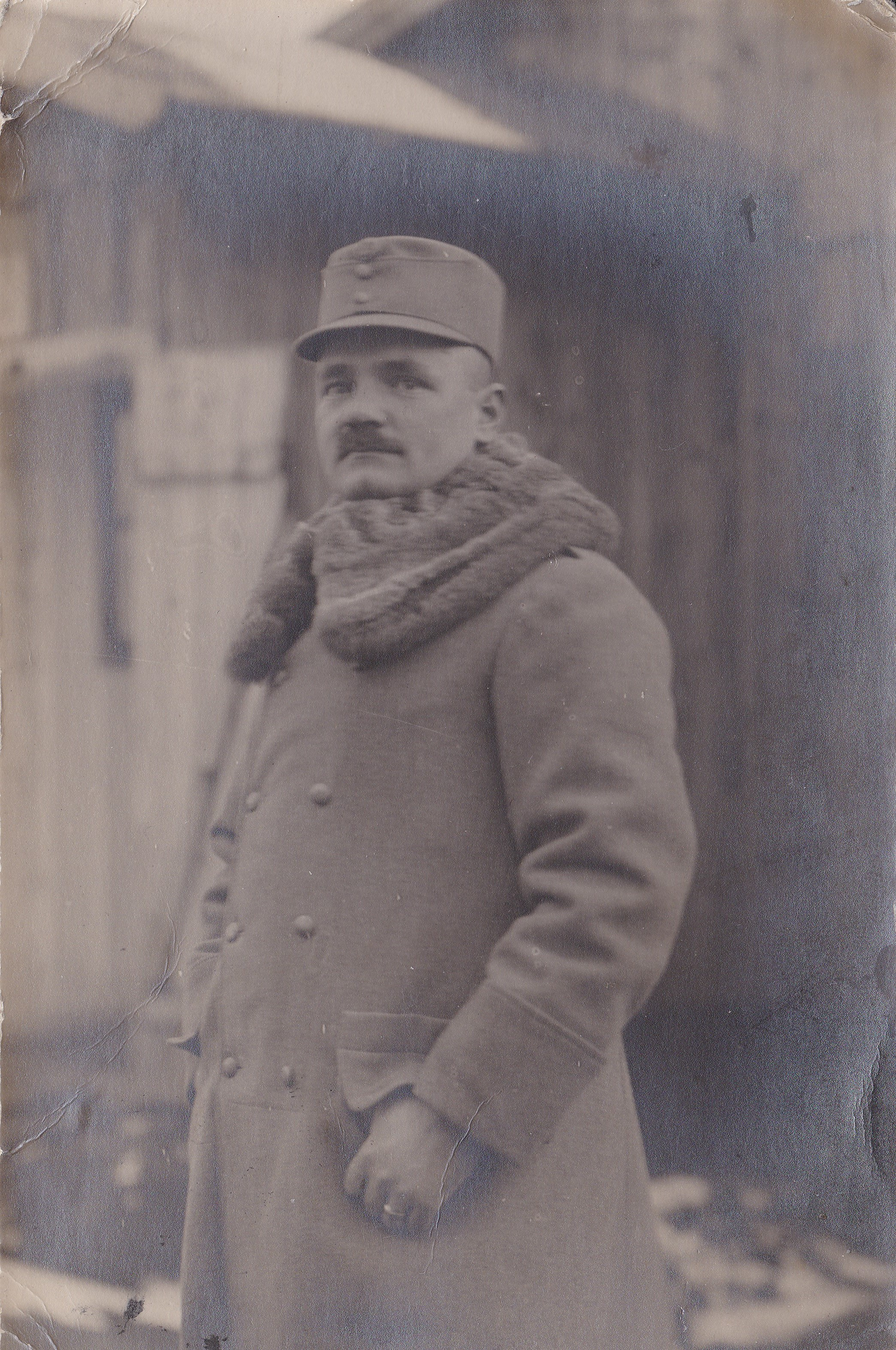 dr. Lux Gyula (1884–1957), tanár, nyelvész, tanügyi főtanácsos, tartalékos hadnagy, a dobsinai és dél-szepesi német kultúra jeles kutatója.